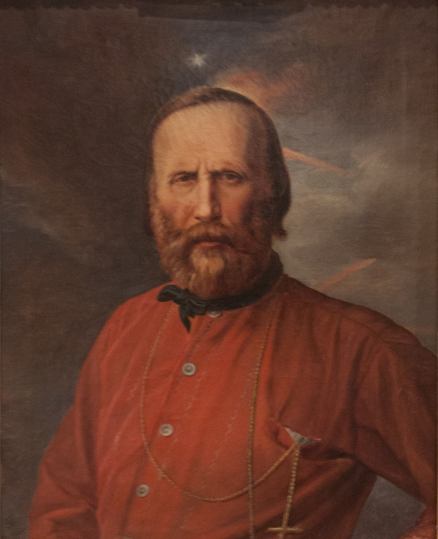 Ritratto di Giuseppe Garibaldi - Salvatore Lo Forte Olio su tela 1860